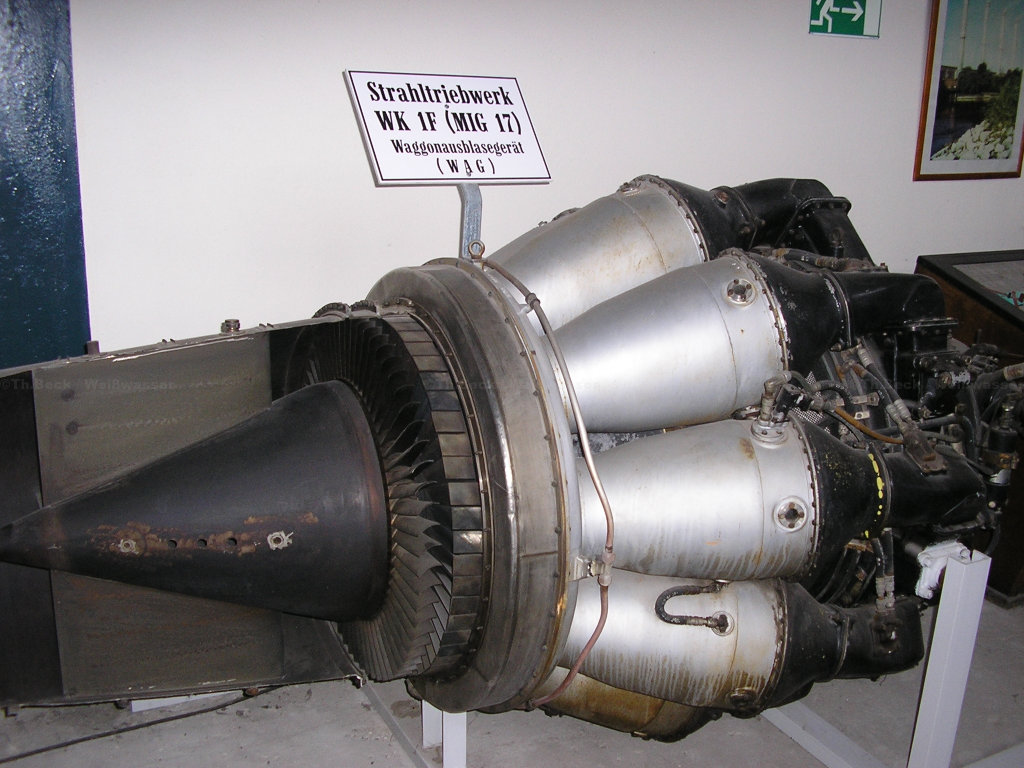 Düsentriebwerk einer MiG-17. Wurde zum Ausblasen (Reinigen) der Kohlewaggons im Kraftwerk Zschornewitz benutzt.